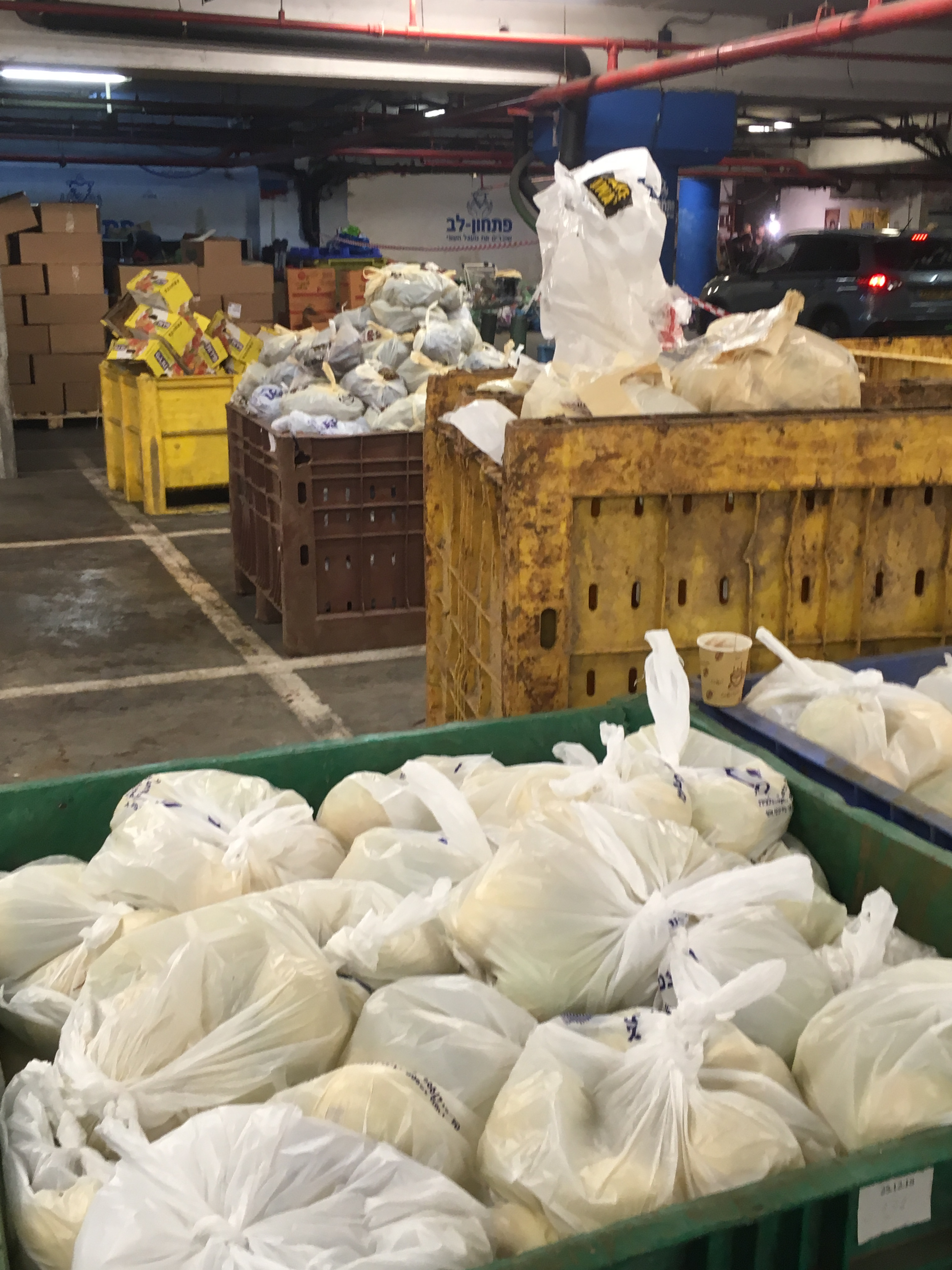 פתחון לב ראשון לציון